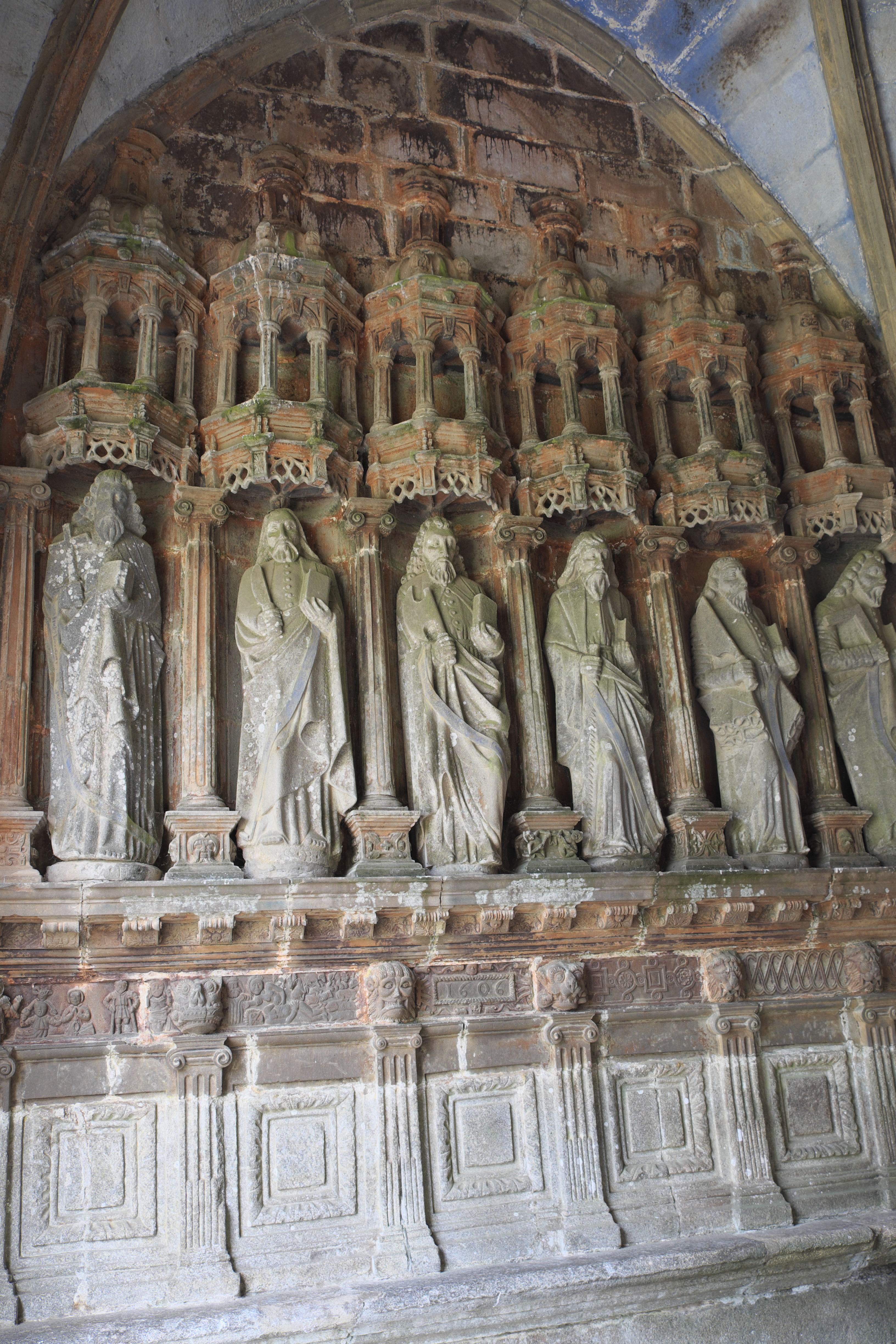 Katholische Pfarrkirche Saint-Miliau in Guimiliau im Département Finistère (Region Bretagne/Frankreich), südliche Vorhalle mit Apostelfiguren